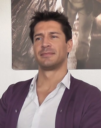 Entrevista al presentador Jaime Cantizano. Octubre 2012.